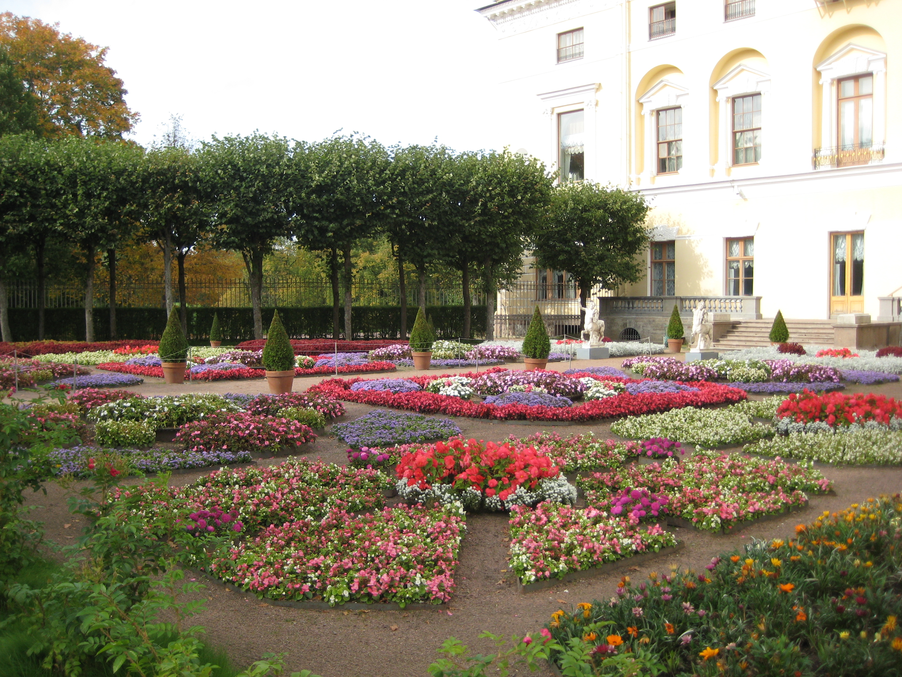 Павловский парк. Собственный садик.